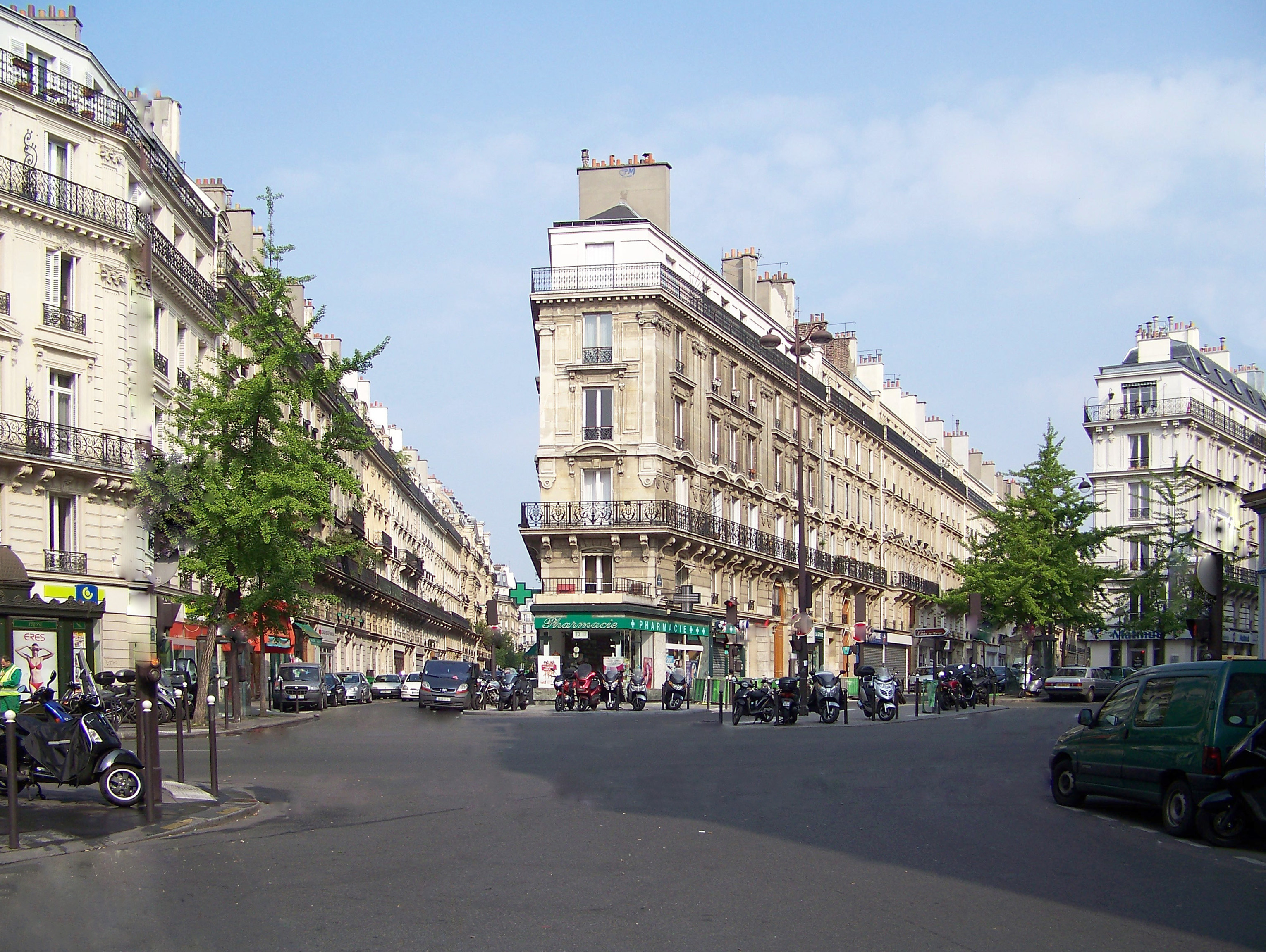 Place de Dublin, Paris.